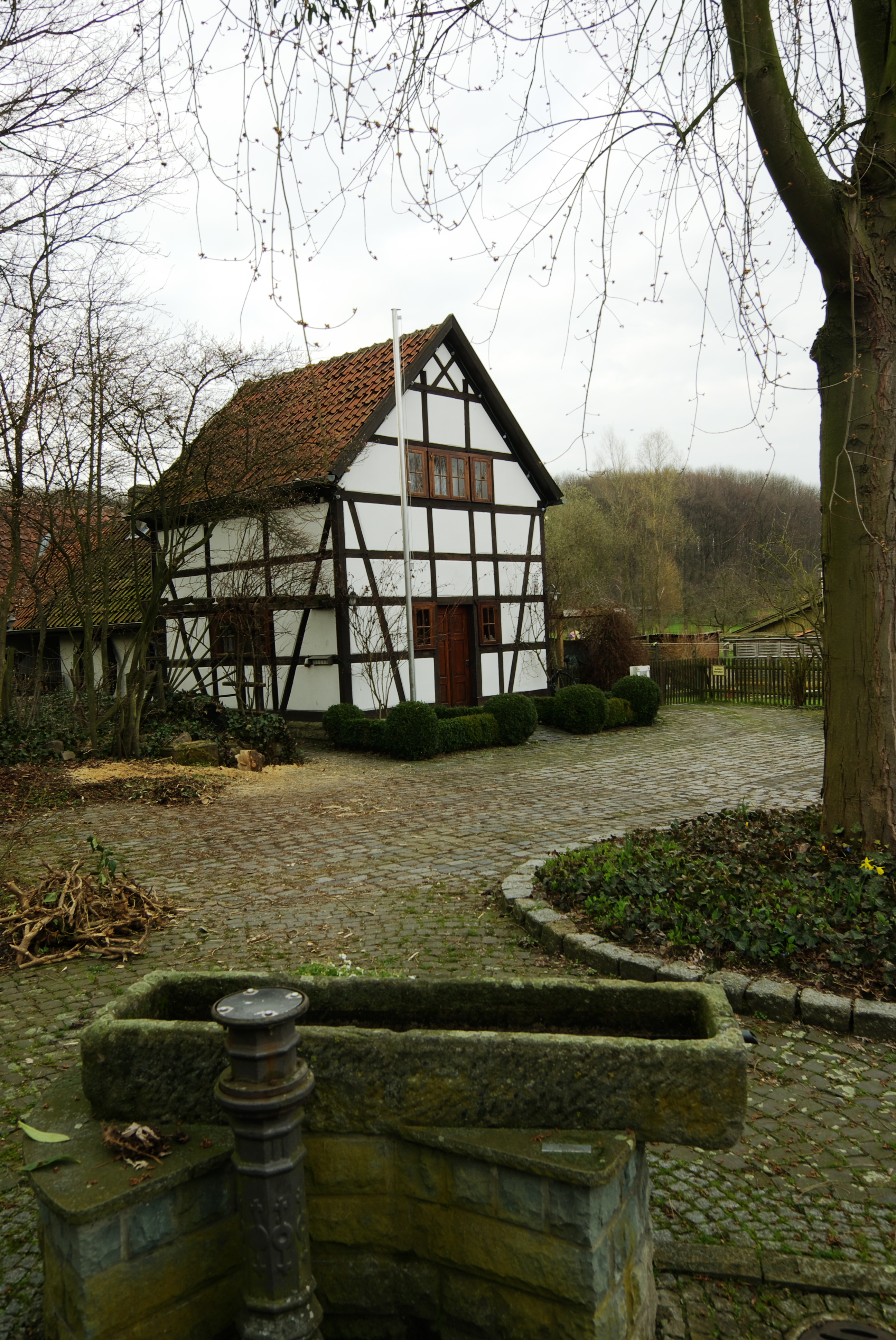 Das Backhaus in Flierich, Bönen, Nordrhein-Westfalen